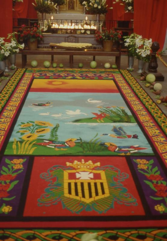 Antigua (Guatemala): Chiesa di San Francesco Decorazioni con segatura colorata Fotografia di Renato Caniatti rilasciata su Wikipedia in GFDL (Renato Caniatti 20:10, Apr 21, 2004 (UTC)). Categoria:Immagini del Guatemala Categoria:Immagini di chiese cattoliche